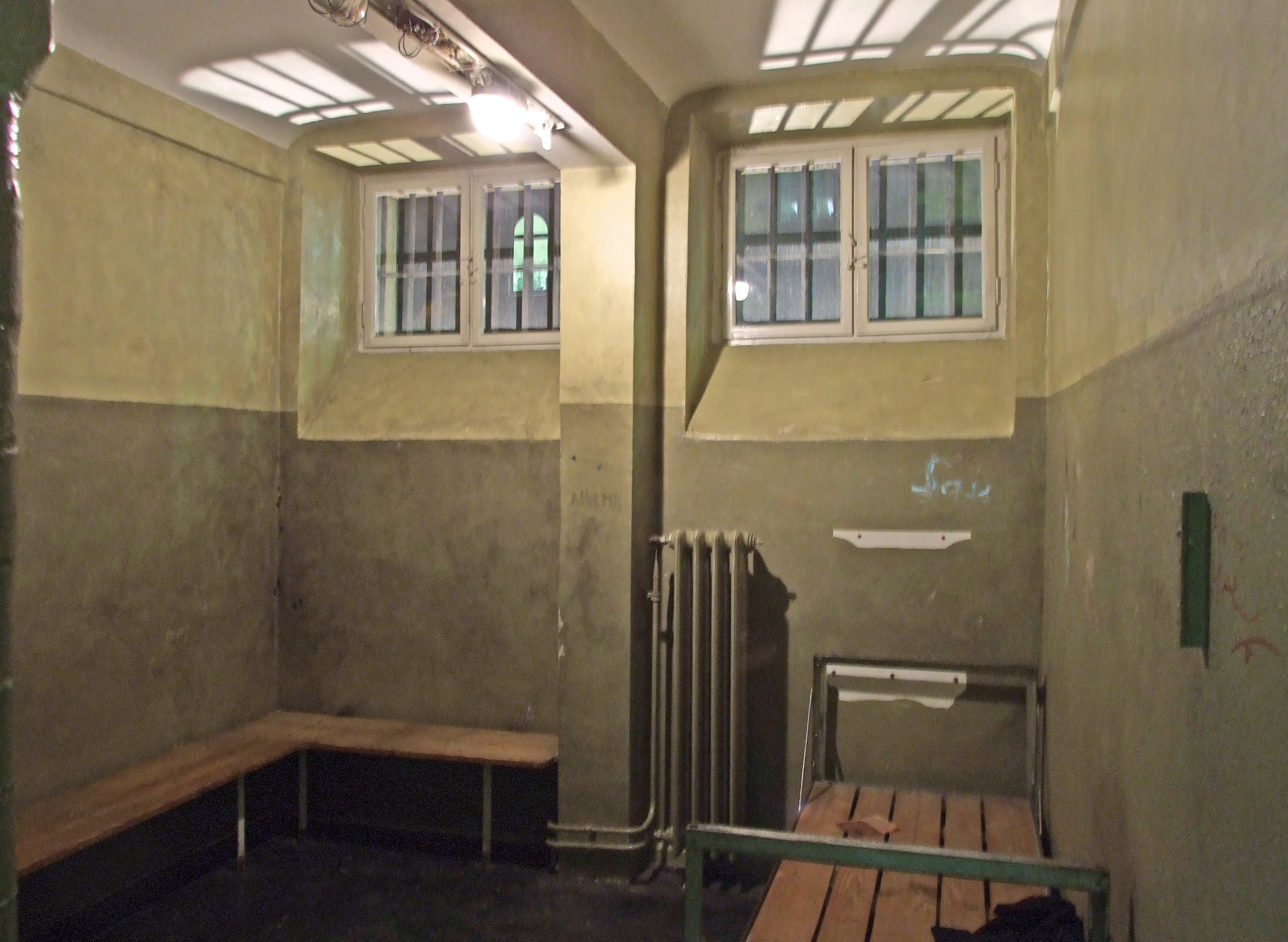 ehemaliger Polizeigewahrsam in der Klapperfeldstrasse beim Gericht in Ffm